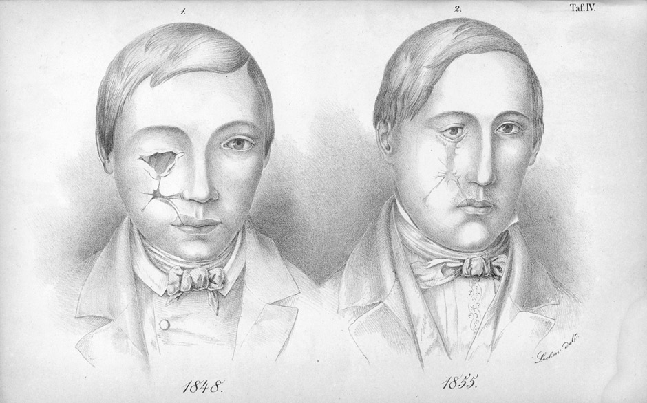 Illustration aus: Ernst Blasius: Neue Beiträge zur praktischen Chirurgie. Nebst einem Bericht über die chirurgisch-augenärztliche Klinik der Königlichen Universität zu Halle während des 25-jährigen Zeitraumes vom 1. Mai 1831 bis zum 1. Mai 1856, Leipzig, Förstner, 1857.